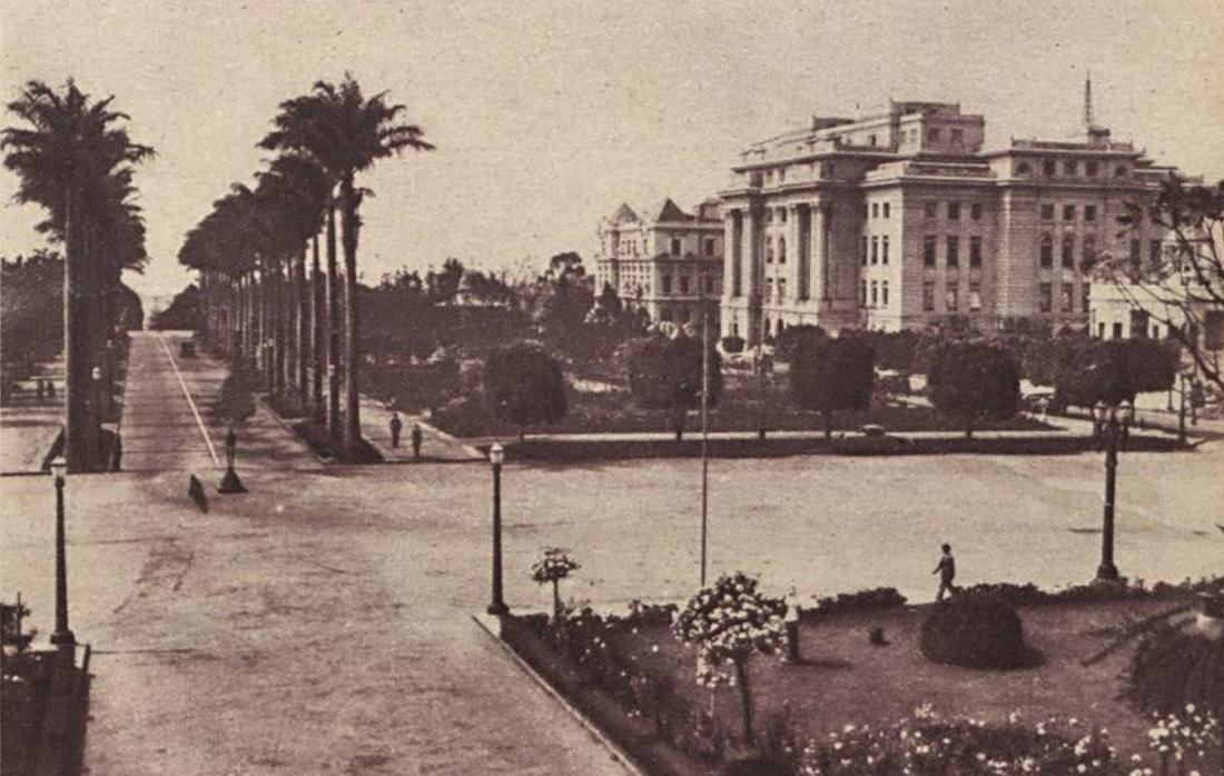 Praça da Liberdade, em Belo Horizonte, Minas Gerais, Brasil, 1935.